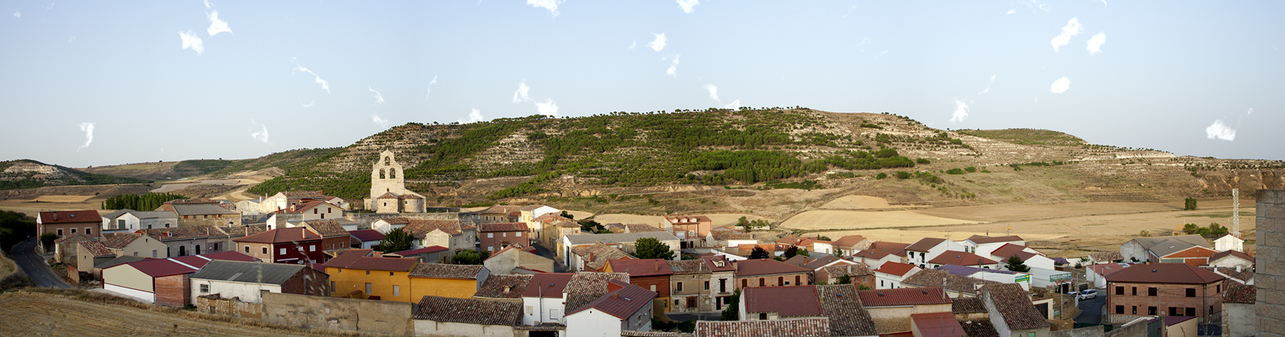 Vista desde las bodegas